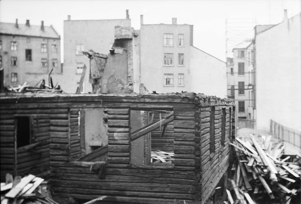 Laftehus i Smedgangen 1 rives, mens murhus er oppført omkring. Foto: Fritz Holland/Oslo Museum, 1935.